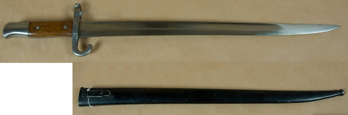 Bajonet in nožnica avstroogrske puške Mannlicher M1885.